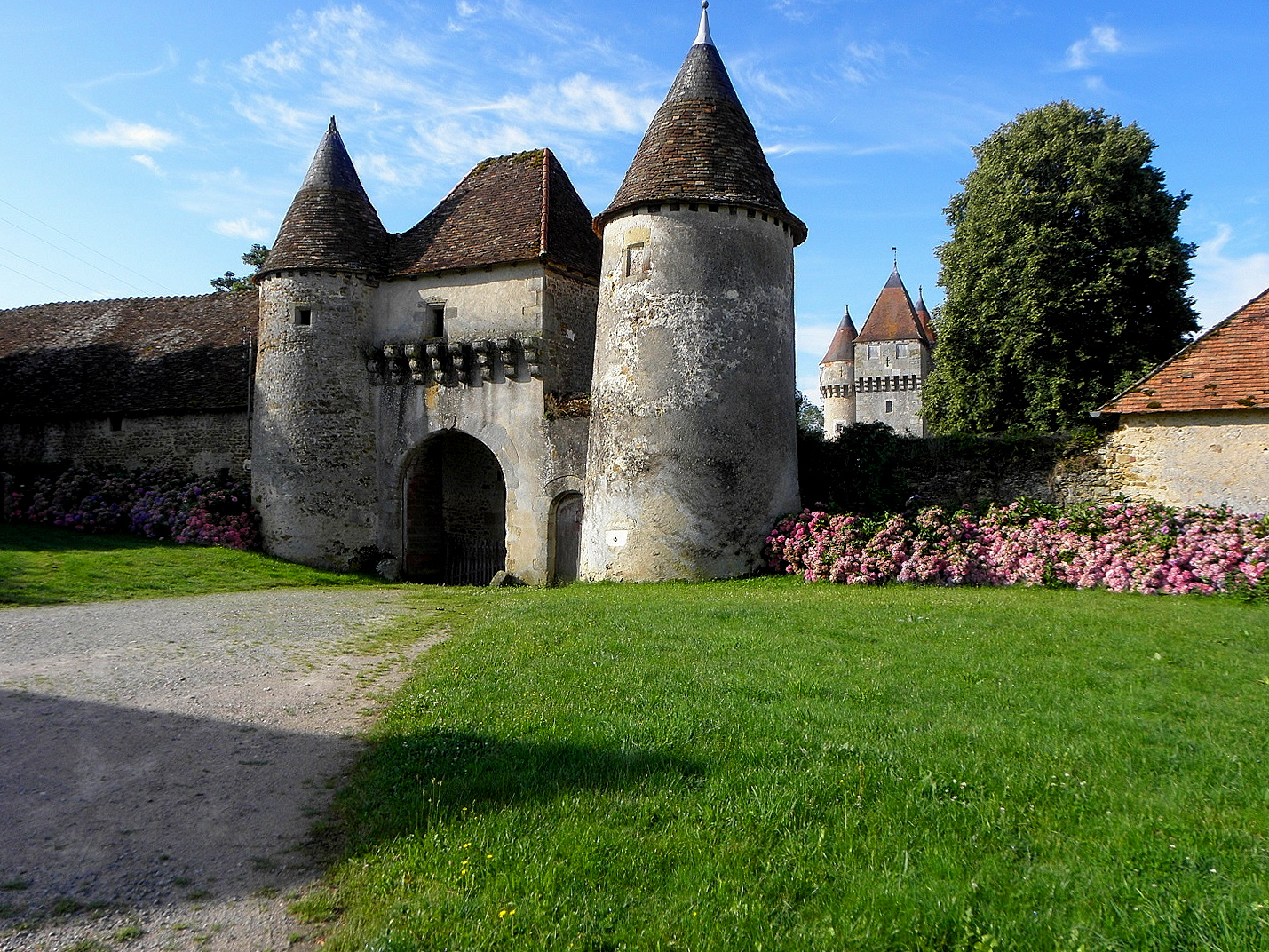 Château de Chazelet (36).